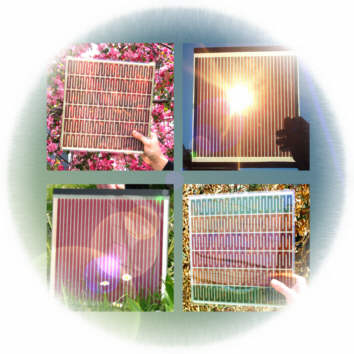 Farbstoffsolarmodule der Größe 30 x 30 cm² in verschiedenen Designs und Farben. Die Verkapslung besteht aus chemisch und thermisch sehr stabilem Glaslot, um eine langzeitstabile Versieglung des Elektrolyten zu gewährleisten